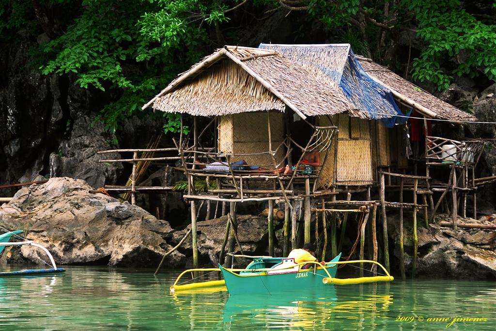 Capanna Tagbanua - Palawan